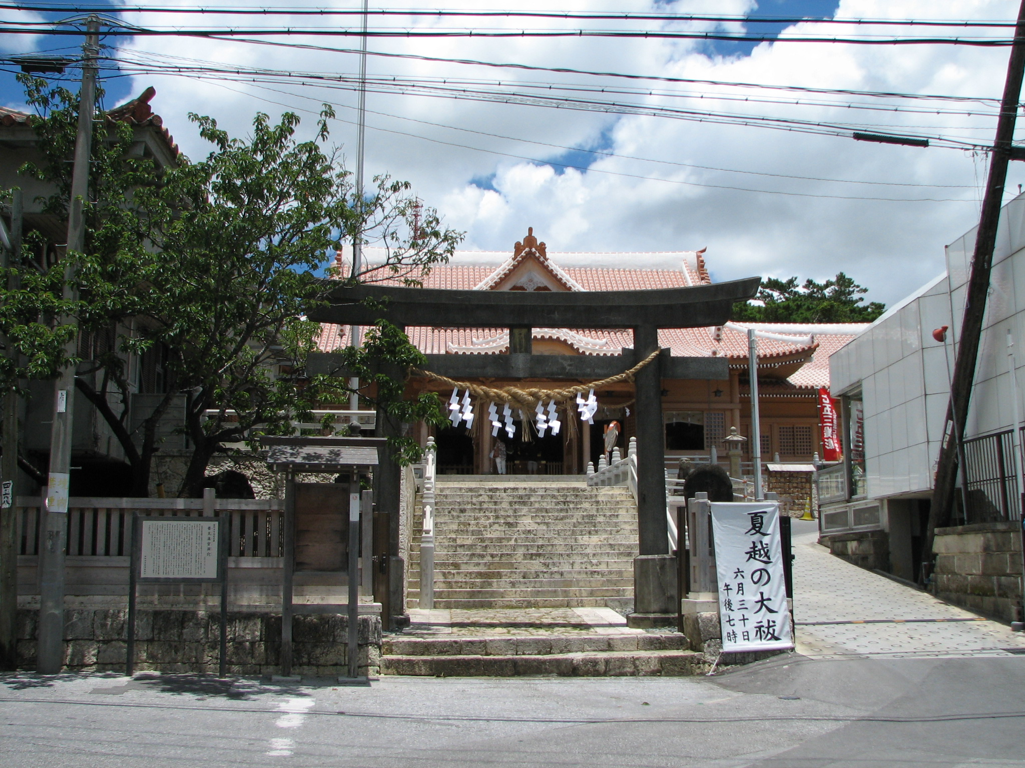 Futemma-gū, Ginowan, Okinawa, Japan 普天満宮（沖縄県宜野湾市）入口